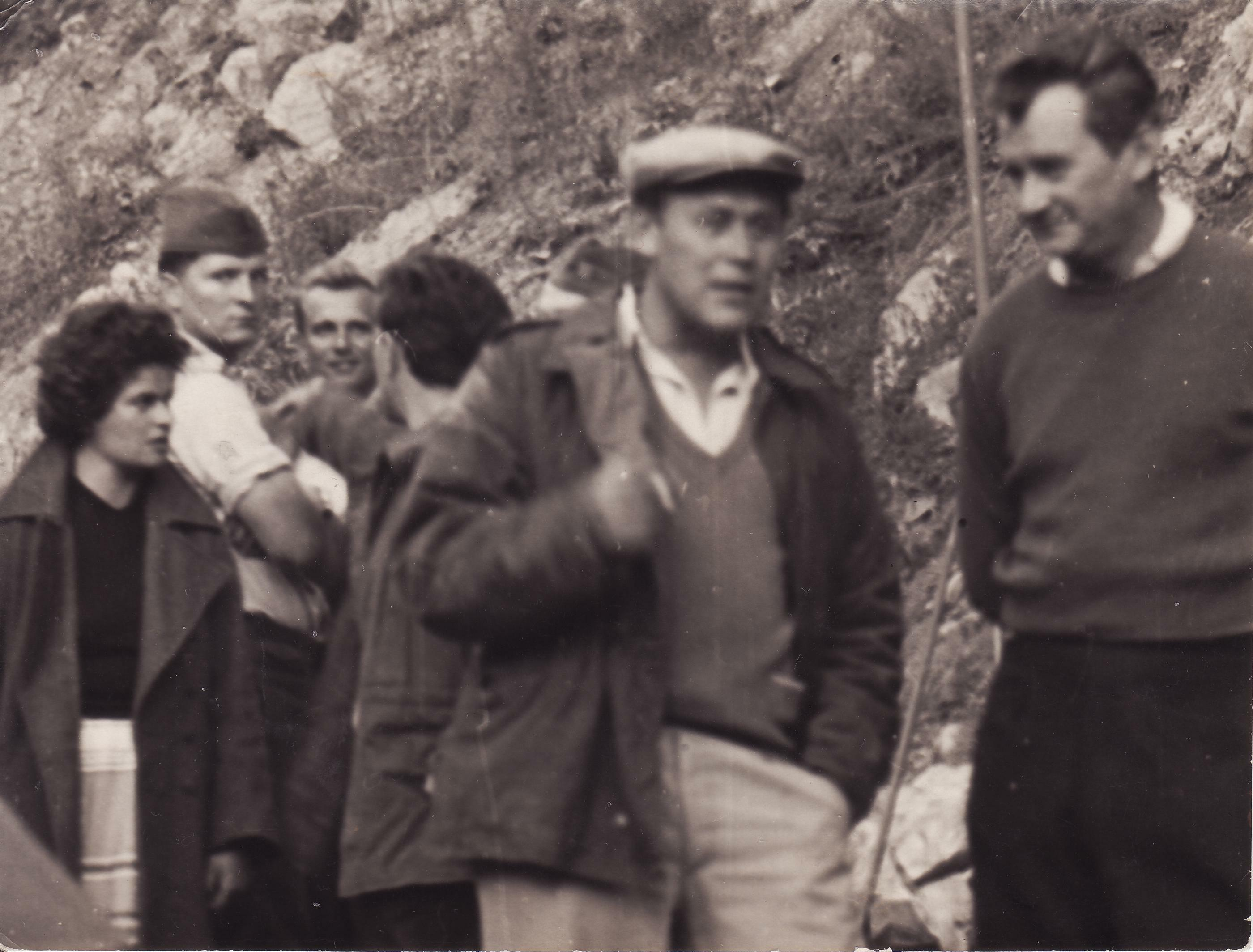 Zdravím, tyto fotografie jsem pořídil coby člen VU32 54, u Zvolena (obsluha vojenského letiště). Naše jednotka dovážela štábu jídlo, a měl sem tudíž možnost vyfotit pana Sováka i se štábem.